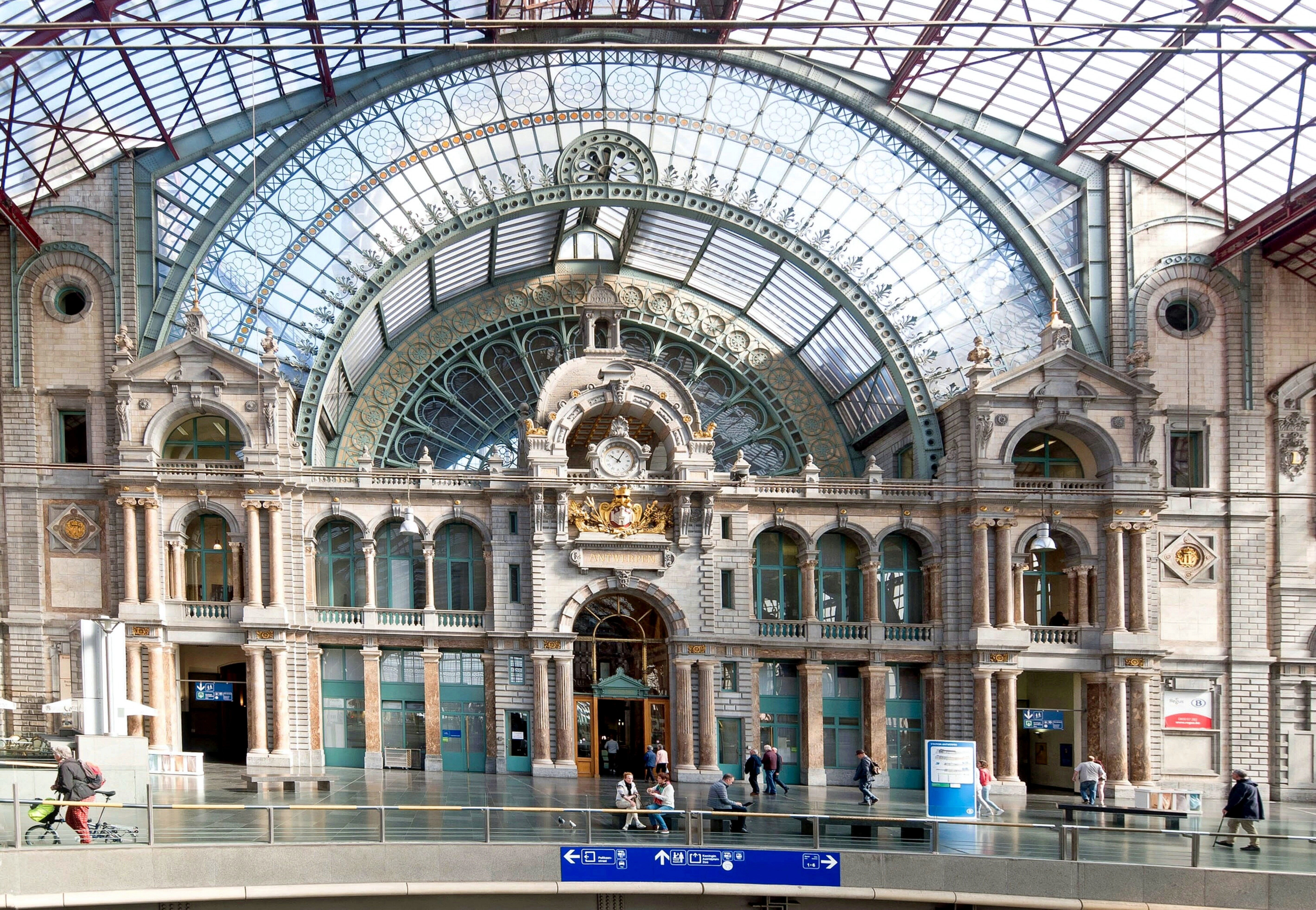 Die prächtige Fassade des Empfangsgebäudes zu den Bahnsteigen